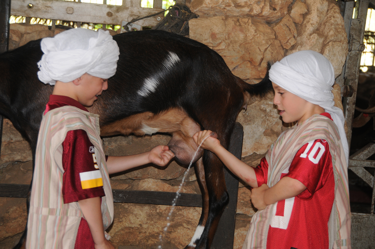 פעילות צאן בכפר קדם